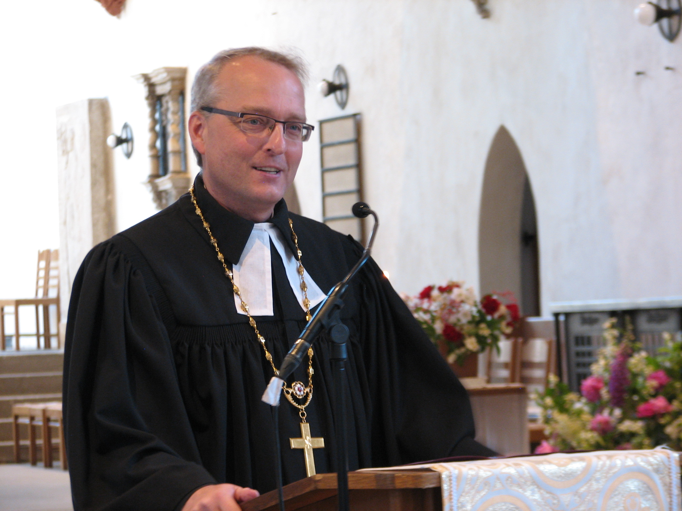 Bischof Carsten Rentzing am 11. Juni 2017 im Dom zu Wurzen